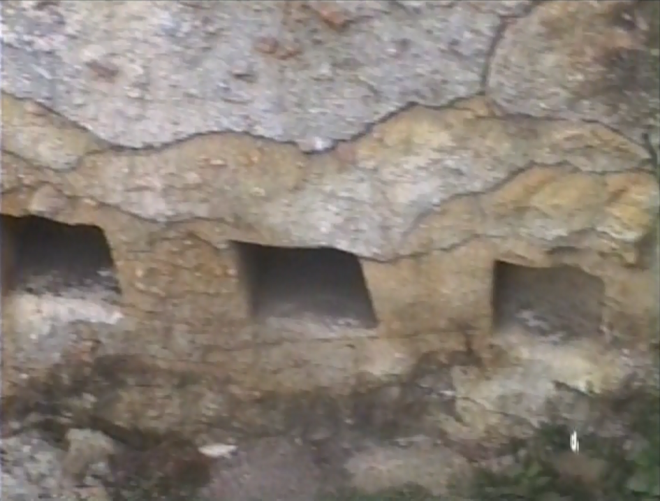 Ventanillas ubicadas en el cerro el mirador